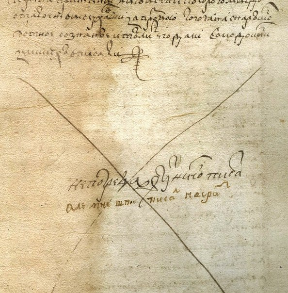 Запись в ранней актовой книге №1 Гродненского земского суда за 1571 г.